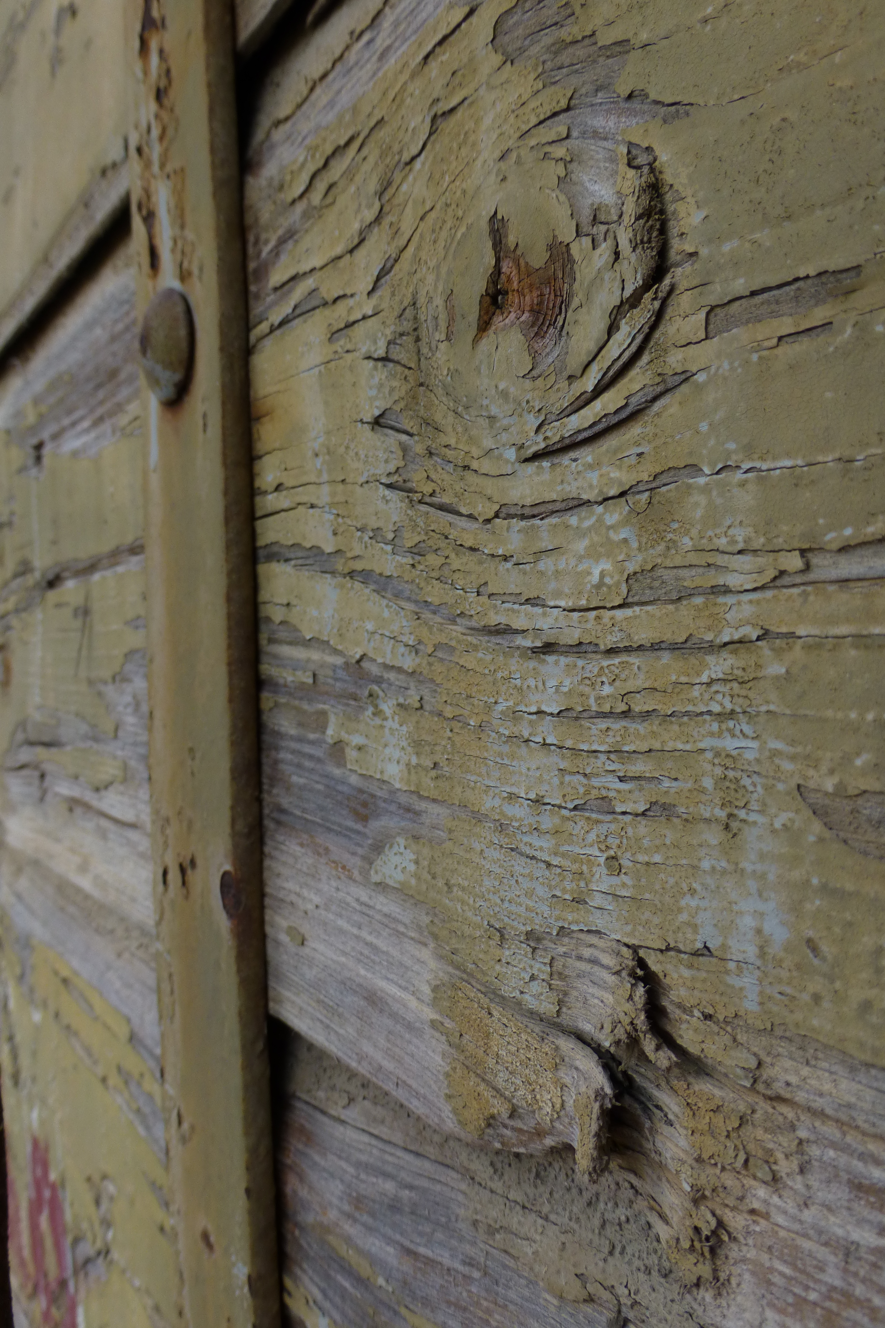 בית המסילאים תחנת רכבת יגור